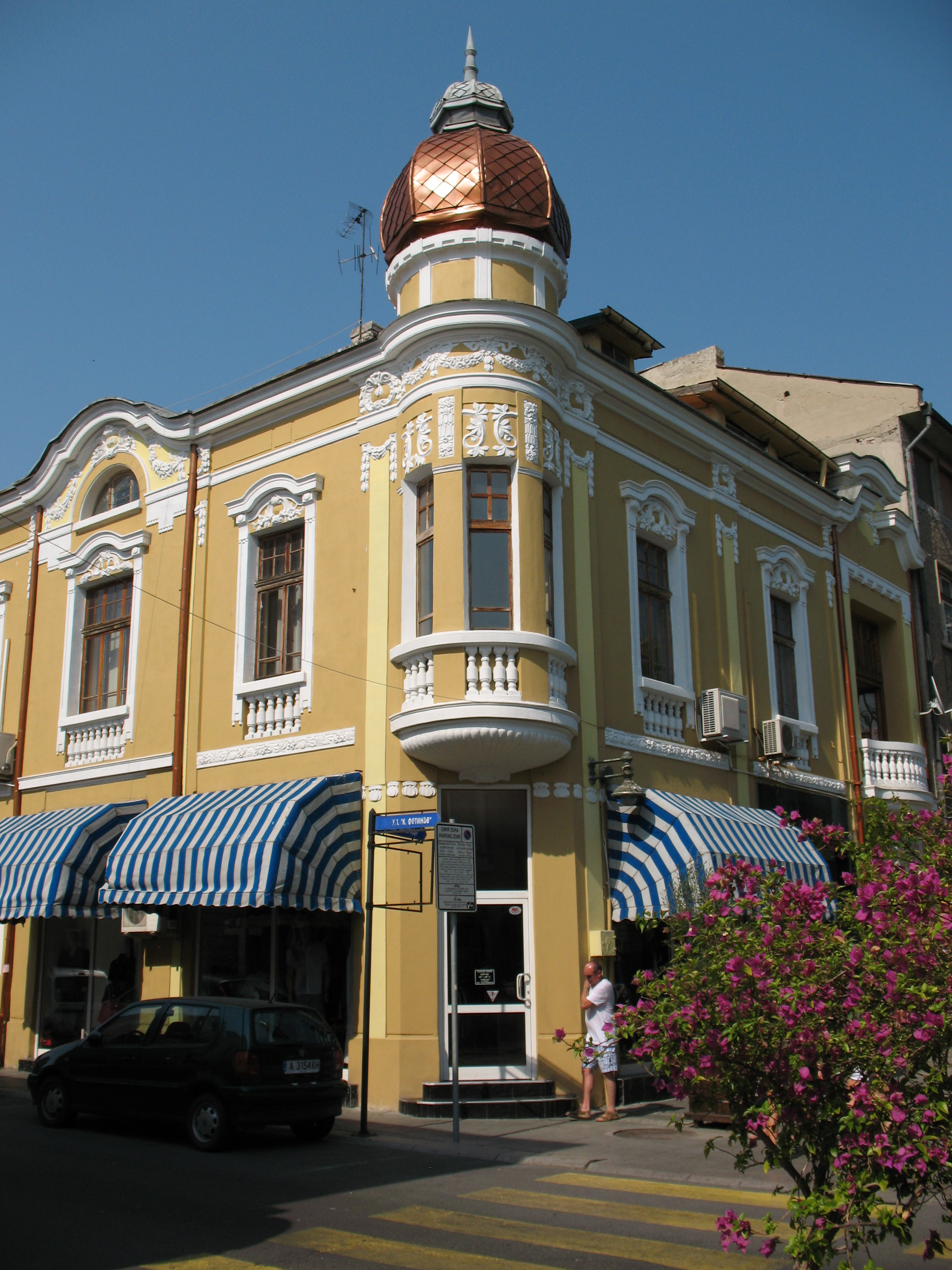 Къщата на Коруджиев на булевард „Алеко Богориди“ 24 в Бургас.